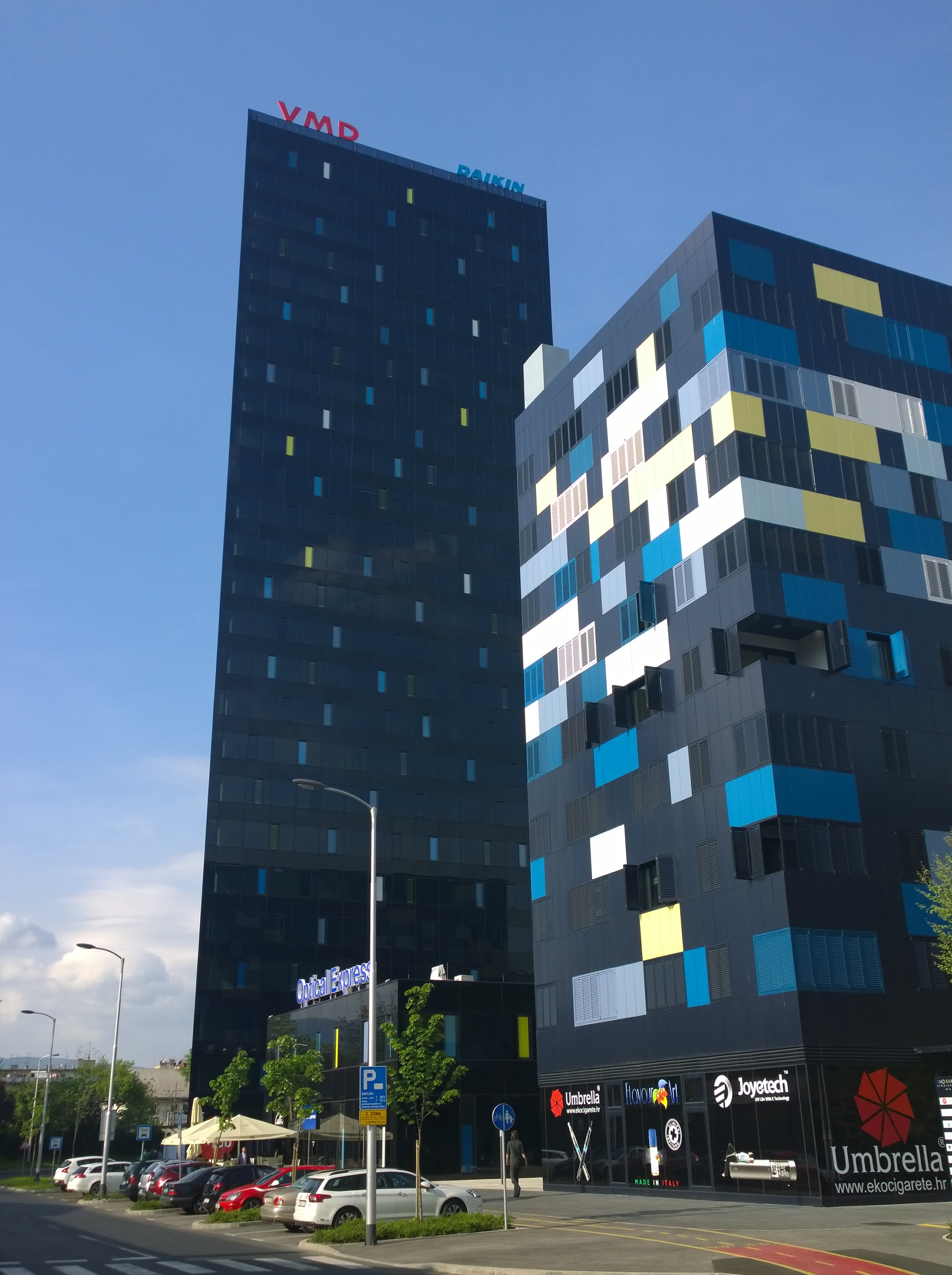 Zagrada B, najviši neboder u sklopu Poslovnog centra Strojarska